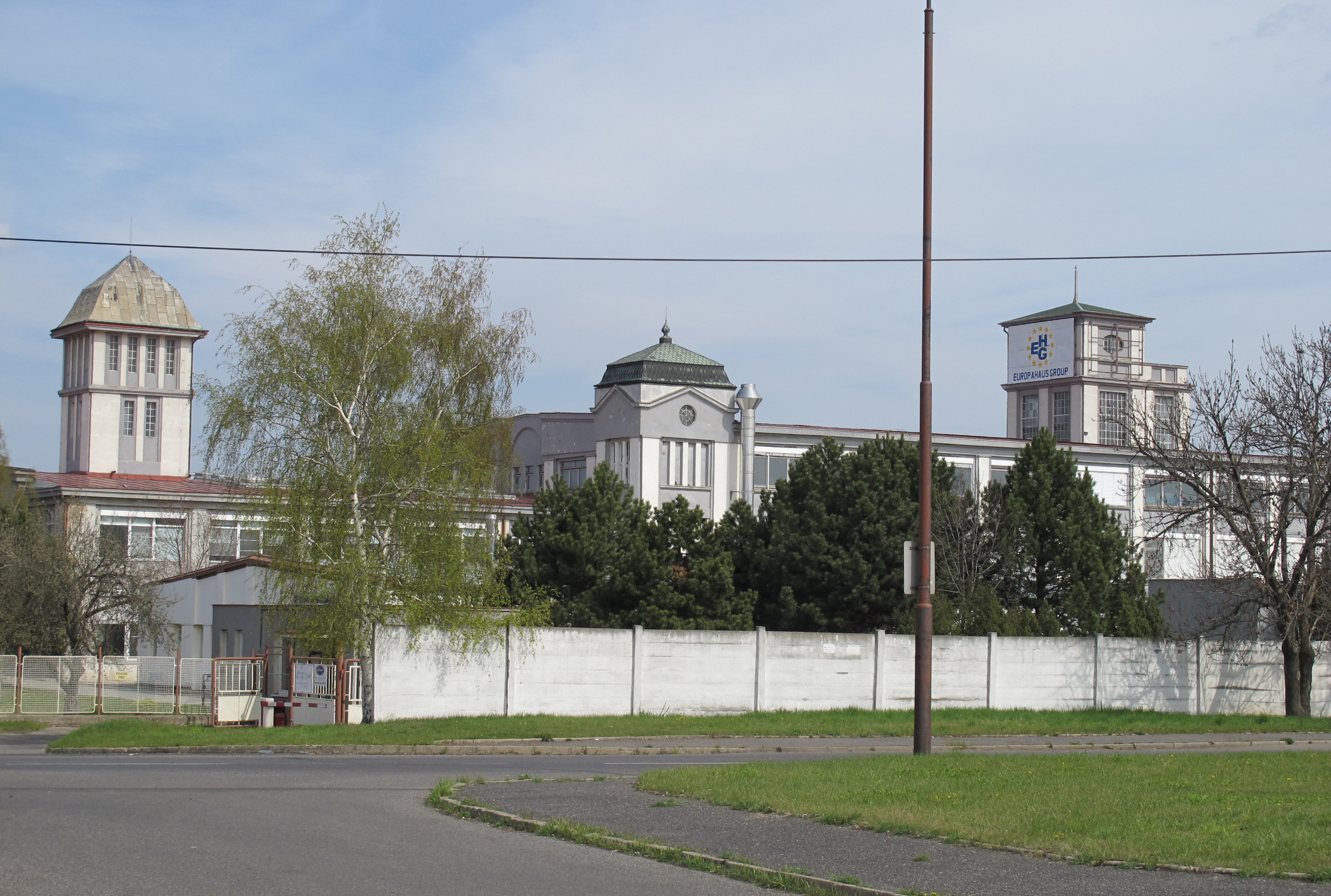 Bývalá továrna RICO v Mostě.